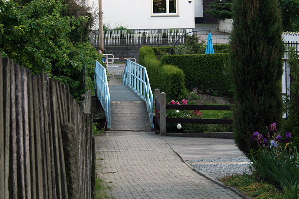 Röderbrücke "Blaues Wunder"